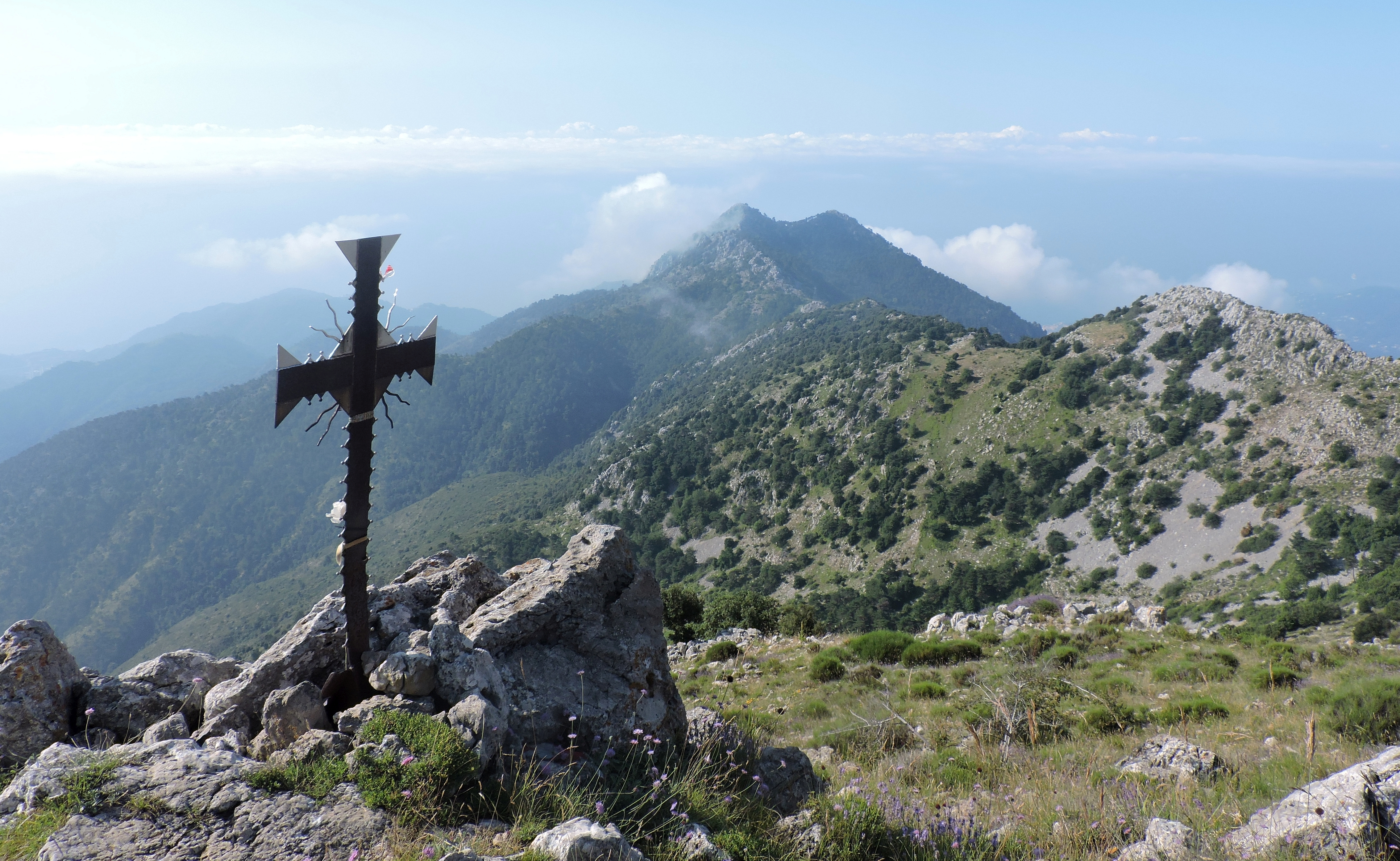 Monte Grammondo - Torrente Bevera (Q47502132)